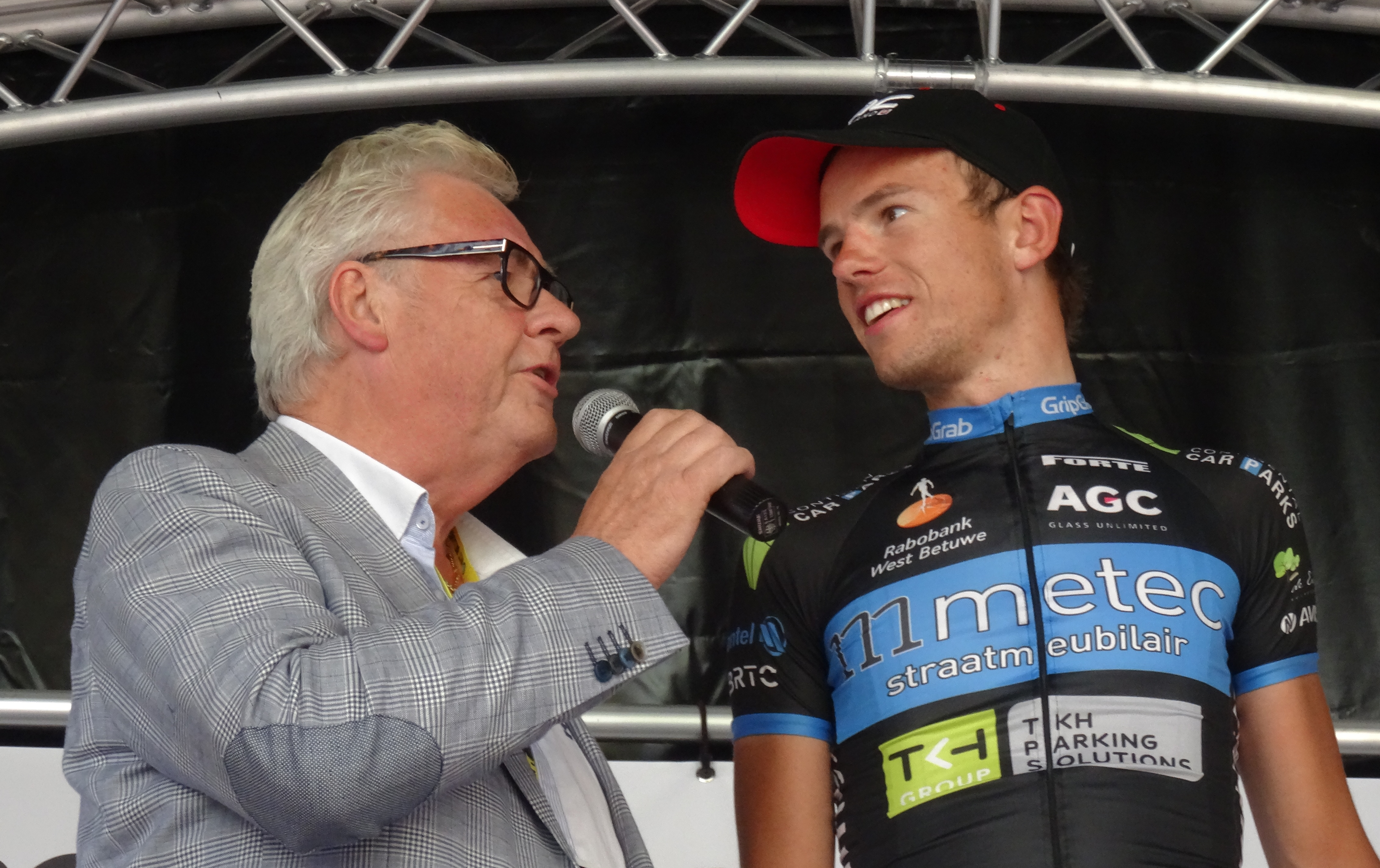 Reportage photographique réalisé le dimanche 15 juin à l'occasion du départ et de l'arrivée du Tour du Limbourg 2014 à Tongres, Belgique.